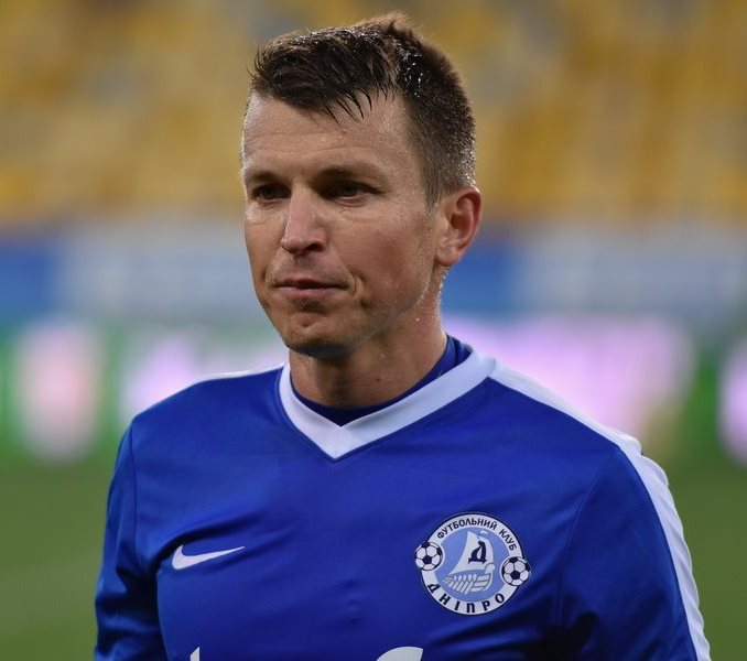 Руслан Ротань - футболіст Дніпра